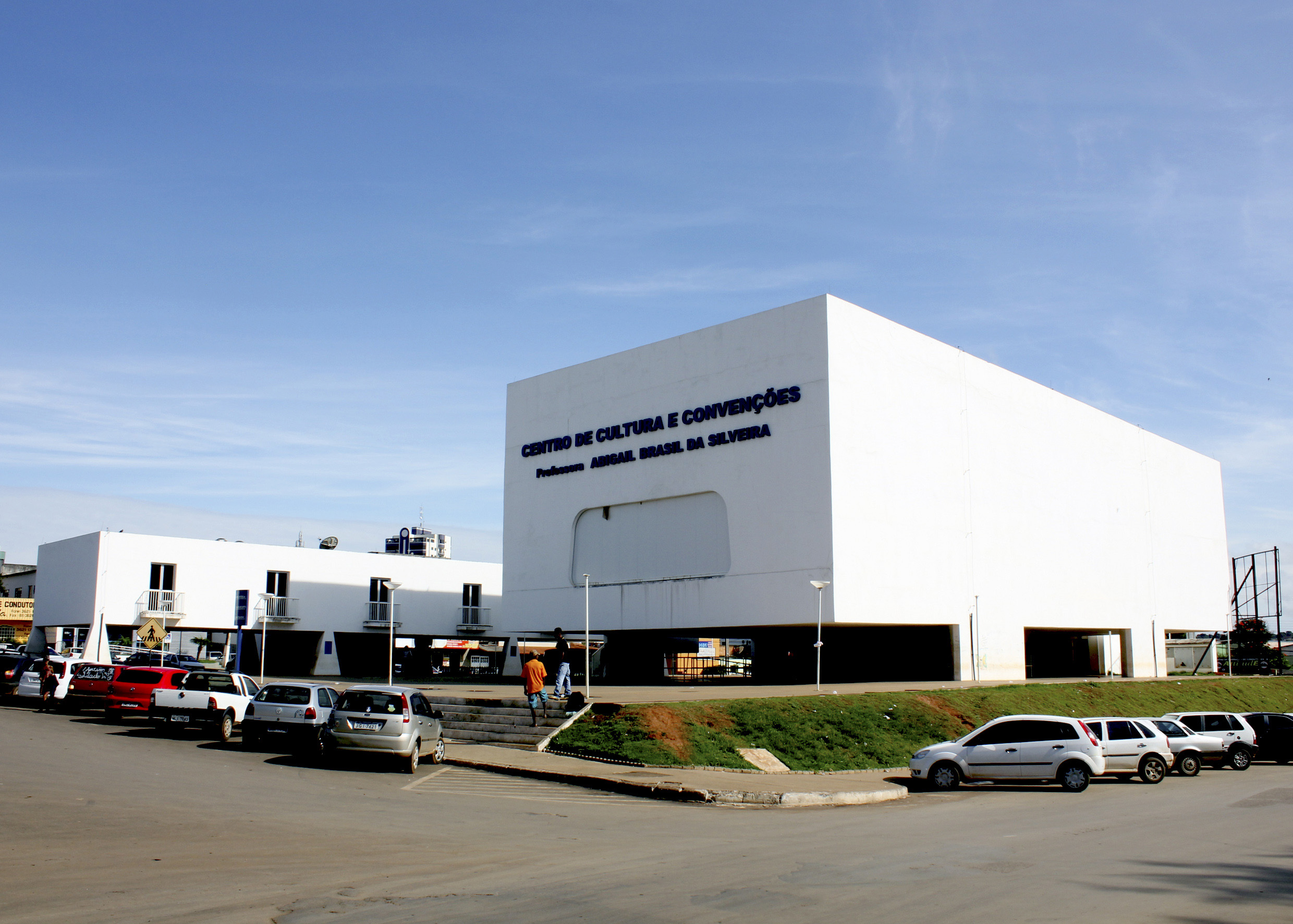 Centro de convenções de Luziânia Goiás, projeto de Oscar Niemeyer